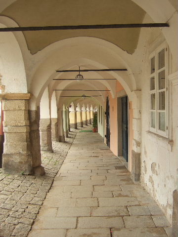 Telč: Arkadengang (2009)